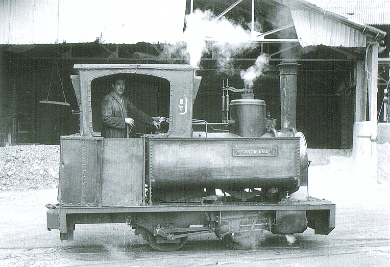 Locomotora Decauville Nº9 Santa Ana (Couillet 1881) en la acería de Moreda, Gijón